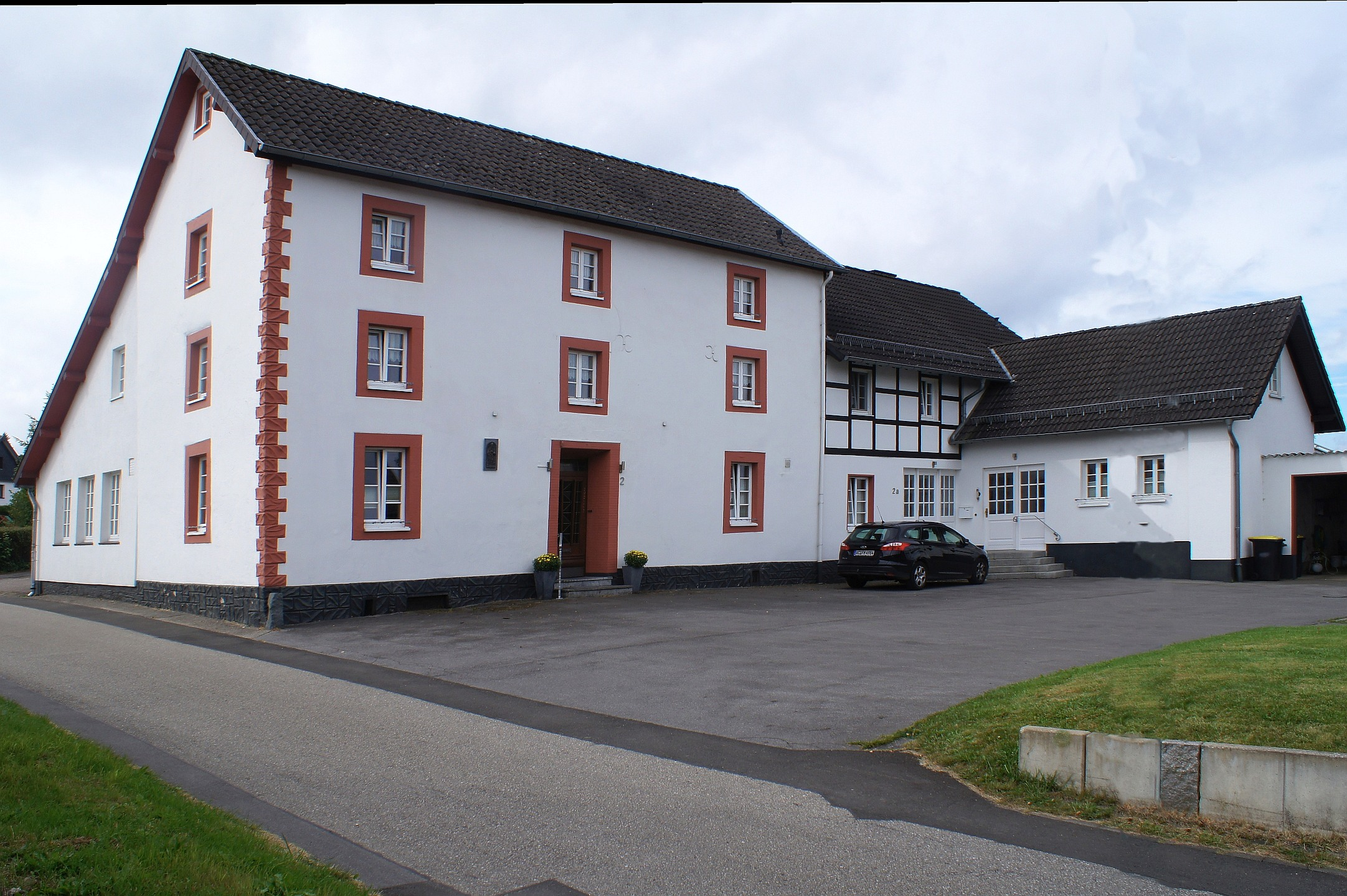 Konzen - auf der Hardt 2This is a photograph of an architectural monument., no. 347